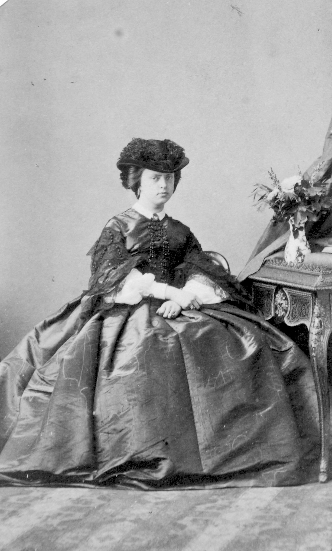 Principessa Imperiale Maria Clotilde di Savoia